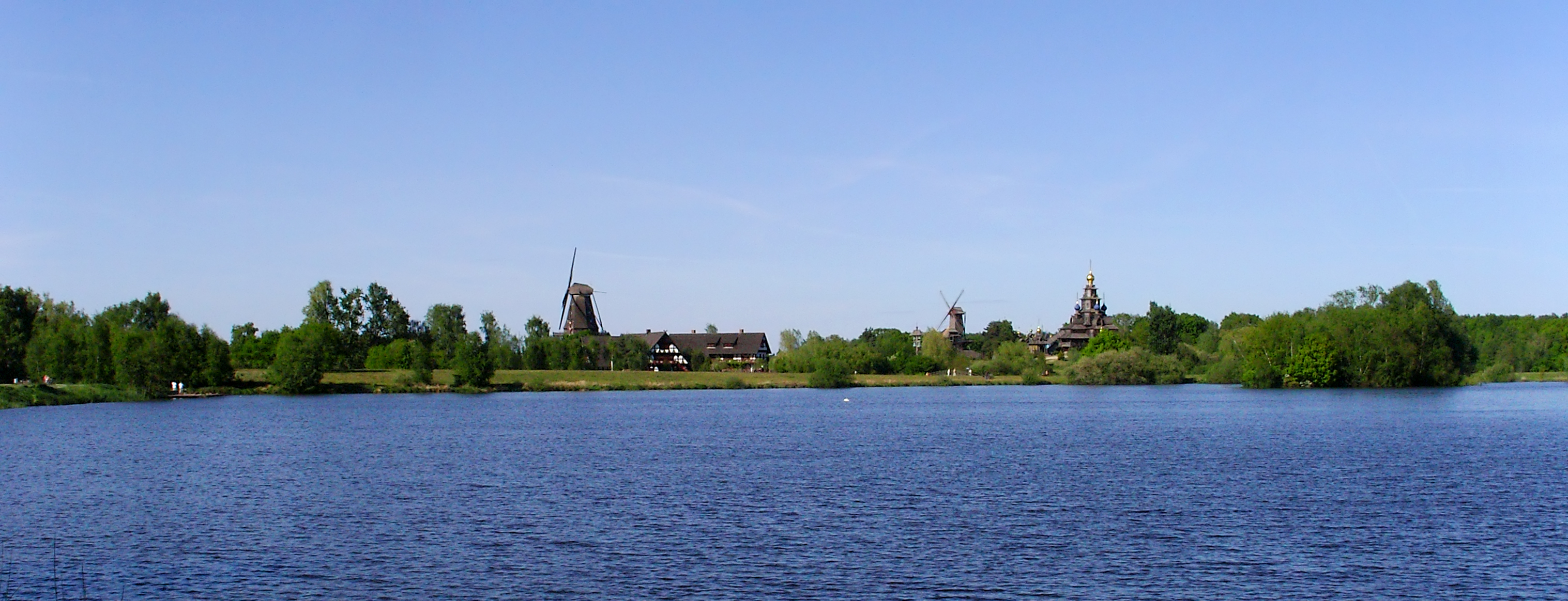 Beschreibung: Das Mühlenmuseums in Gifhorn Aufnahmedatum: 1. Mai 2007 Fotograf: ArtMechanic